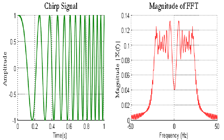 對chirp做fft